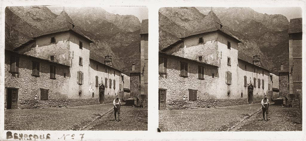 Carrer de Benasc amb un home i muntanyes al fons. Santiago Perdigó i Díaz Caneja (1916-08)